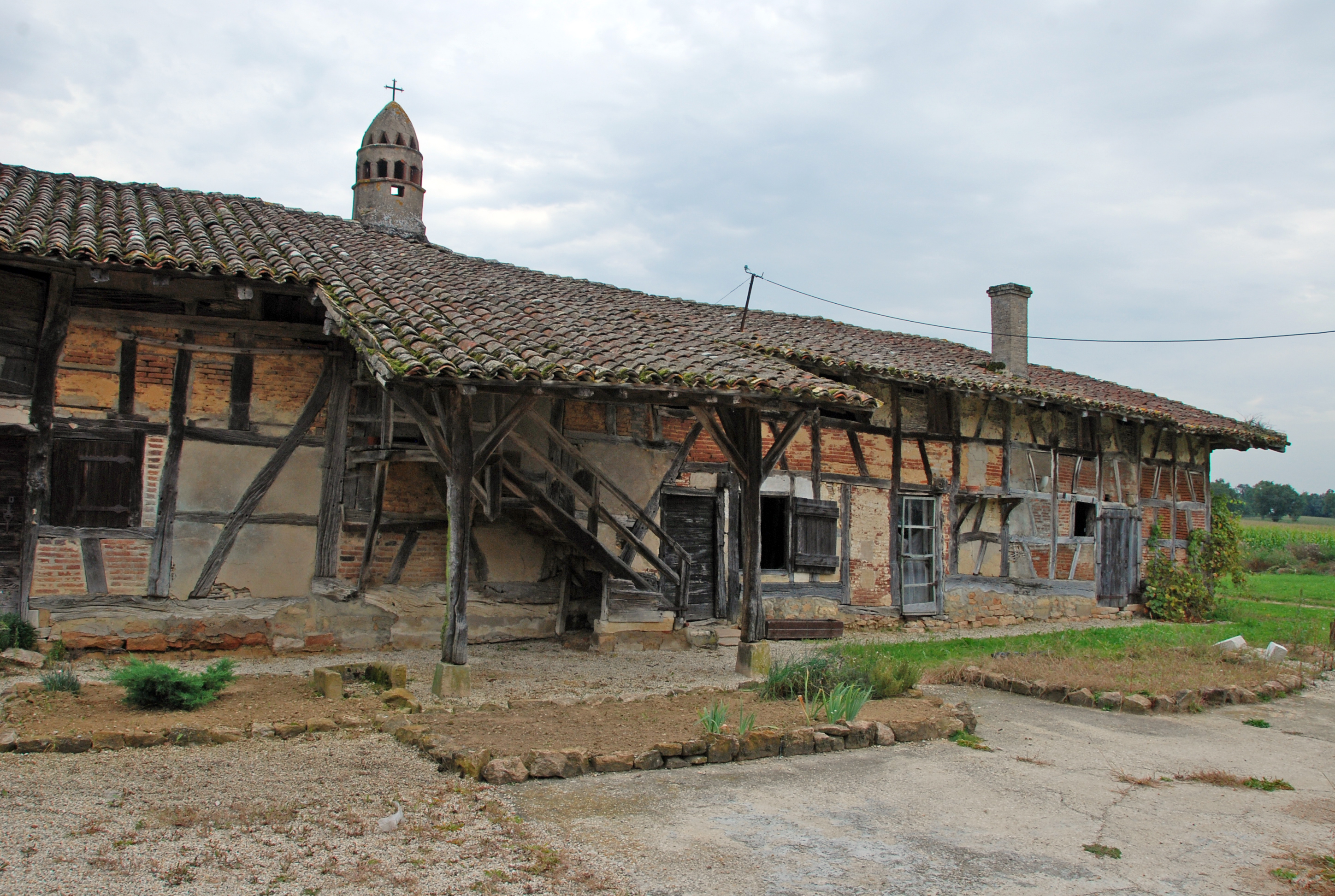 Ferme de Layat, Layat (Classé, 1936) .